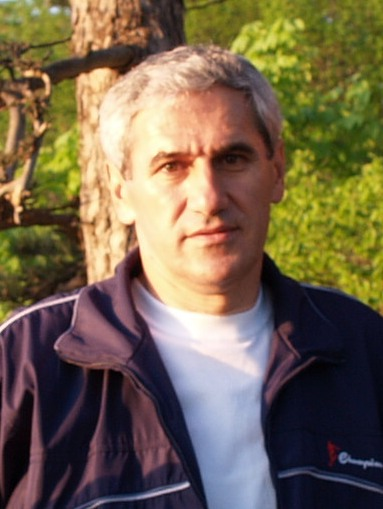 Milenko radević 2005